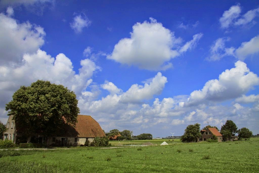 Het uitgestrekte landschap bij de Friese plaats Hitzum in de gemeente Franekeradeel. Locatie bij benadering.